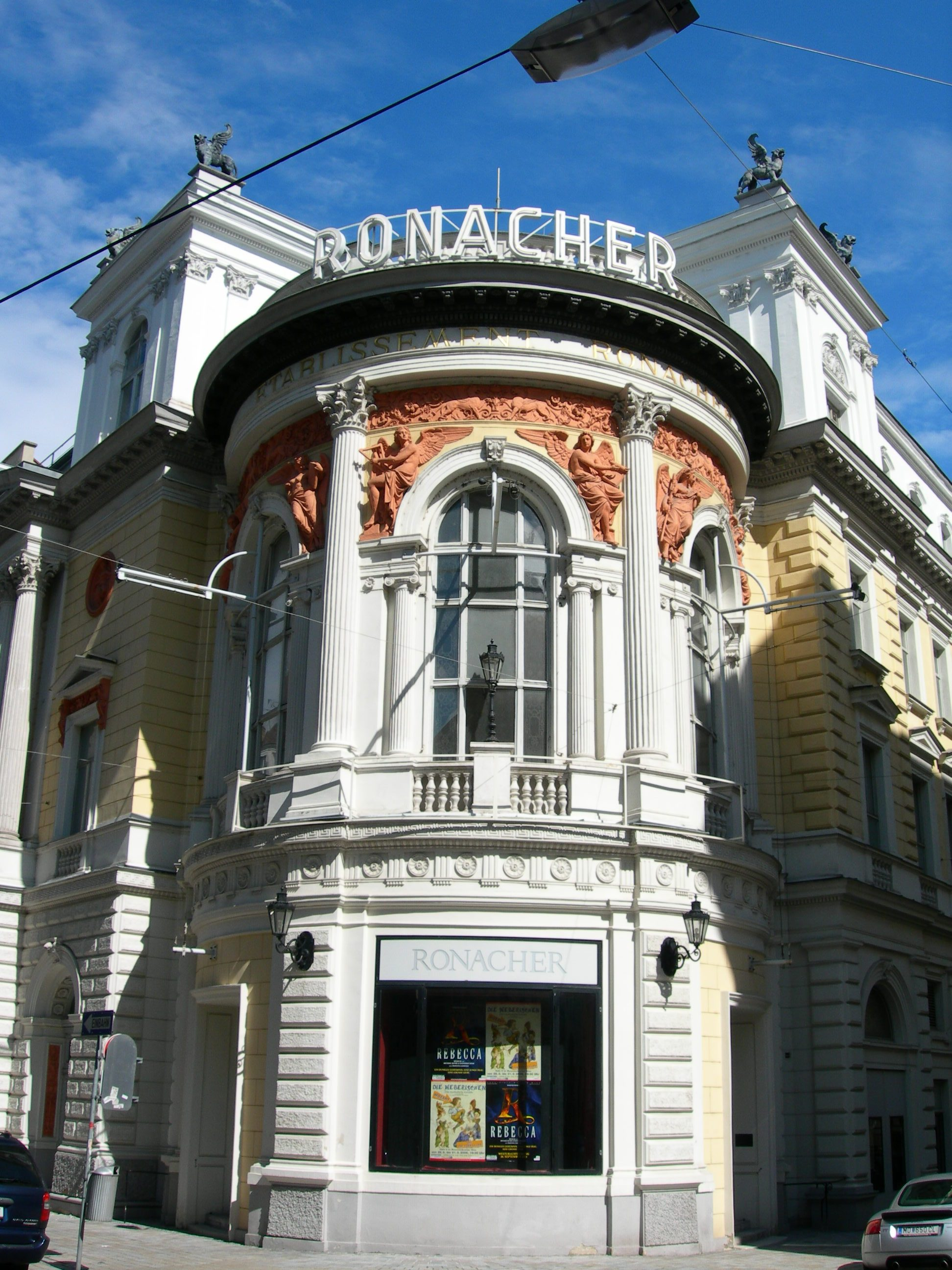 Das Etablissement Ronacher ist ein Theater im 1. Wiener Gemeindebezirk (Innere Stadt), gelegen zwischen Himmelpfortgasse, Seilerstätte und Schellinggasse.